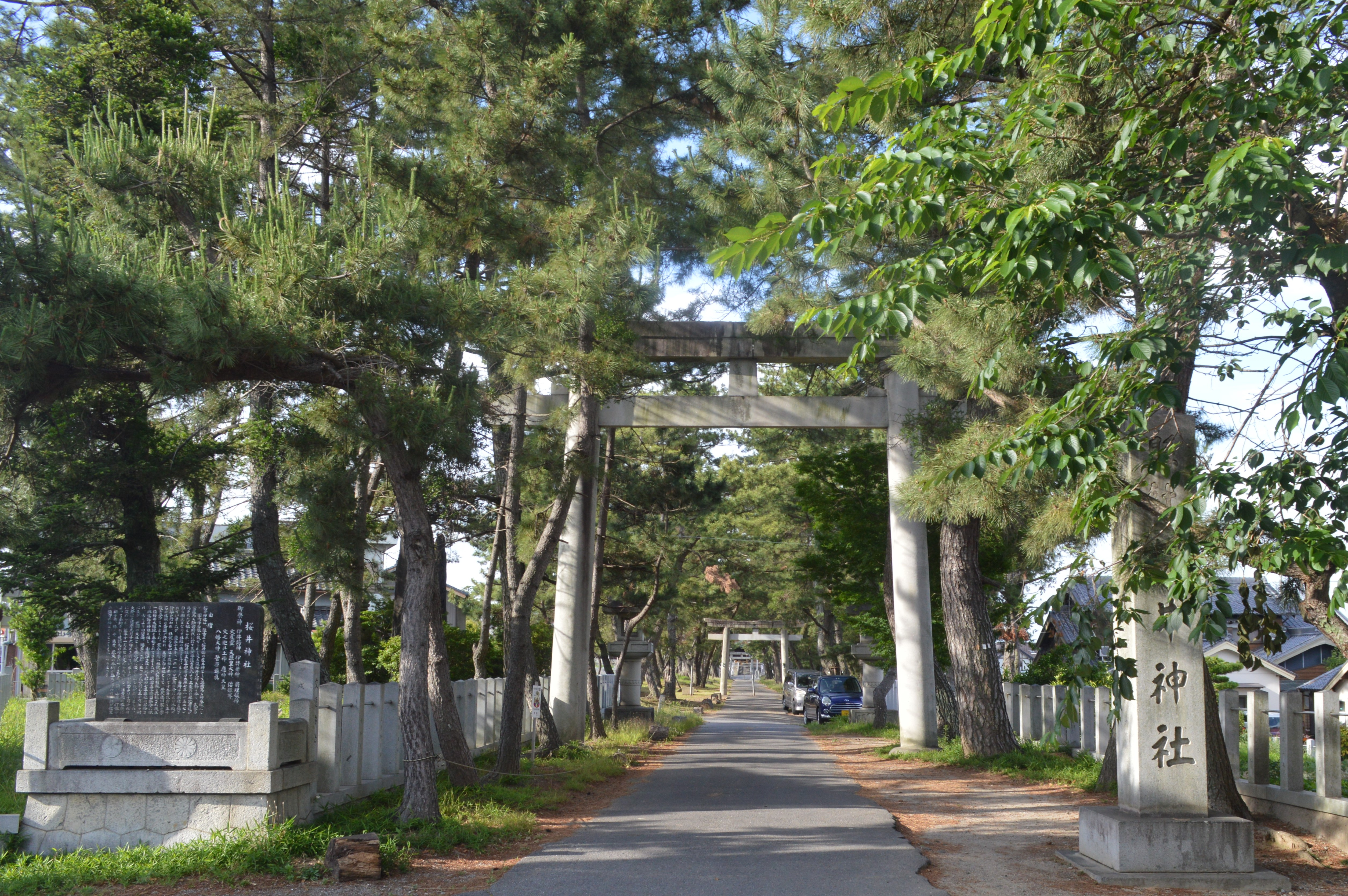 愛知県安城市桜井町にある桜井神社。一の鳥居。